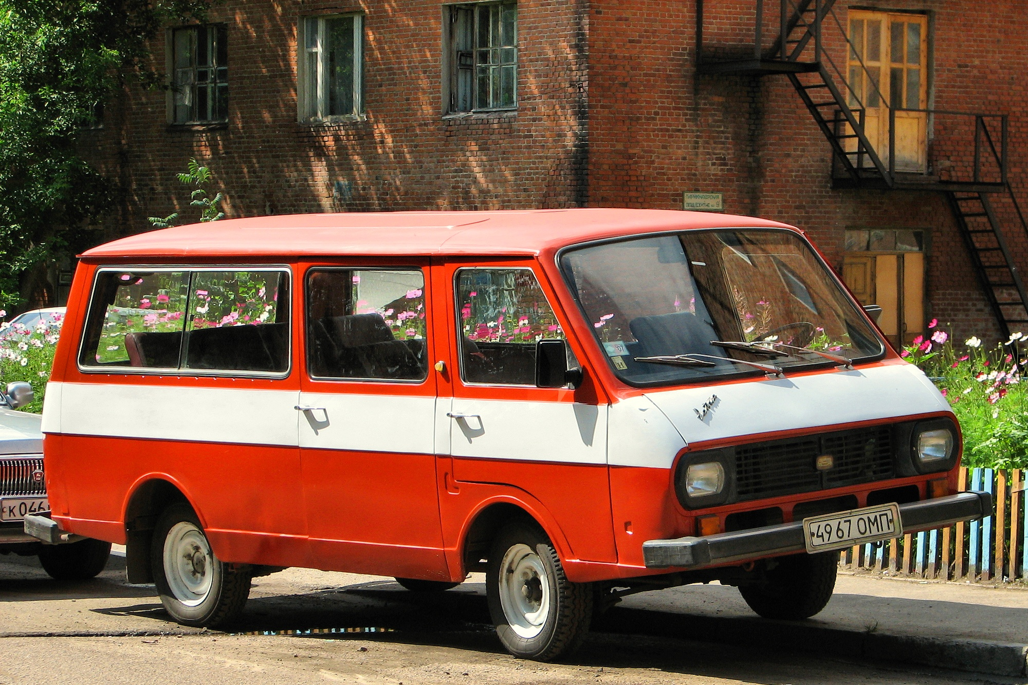 РАФ-2203, Омск